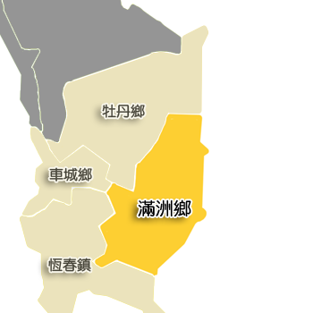 屏東縣滿州鄉相對位置。